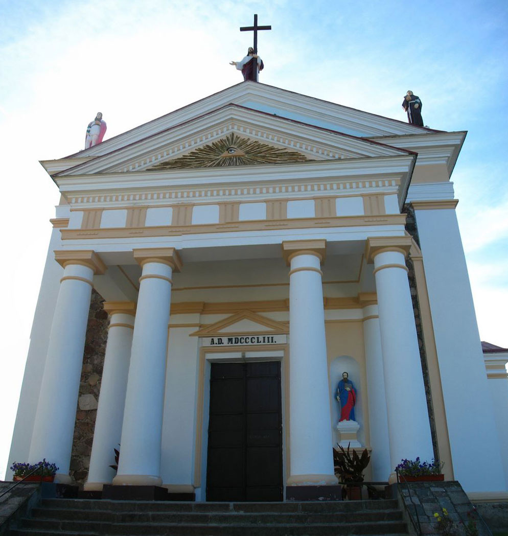 Беларуская (тарашкевіца): Жалудок